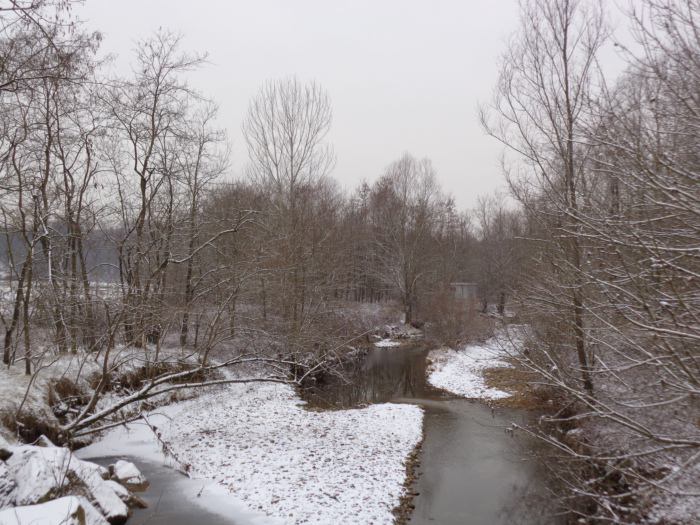 Il Torrente Strona passa poco distante dal centro abitato di Briona. Nell'immagine, in una fredda giornata di pieno inverno